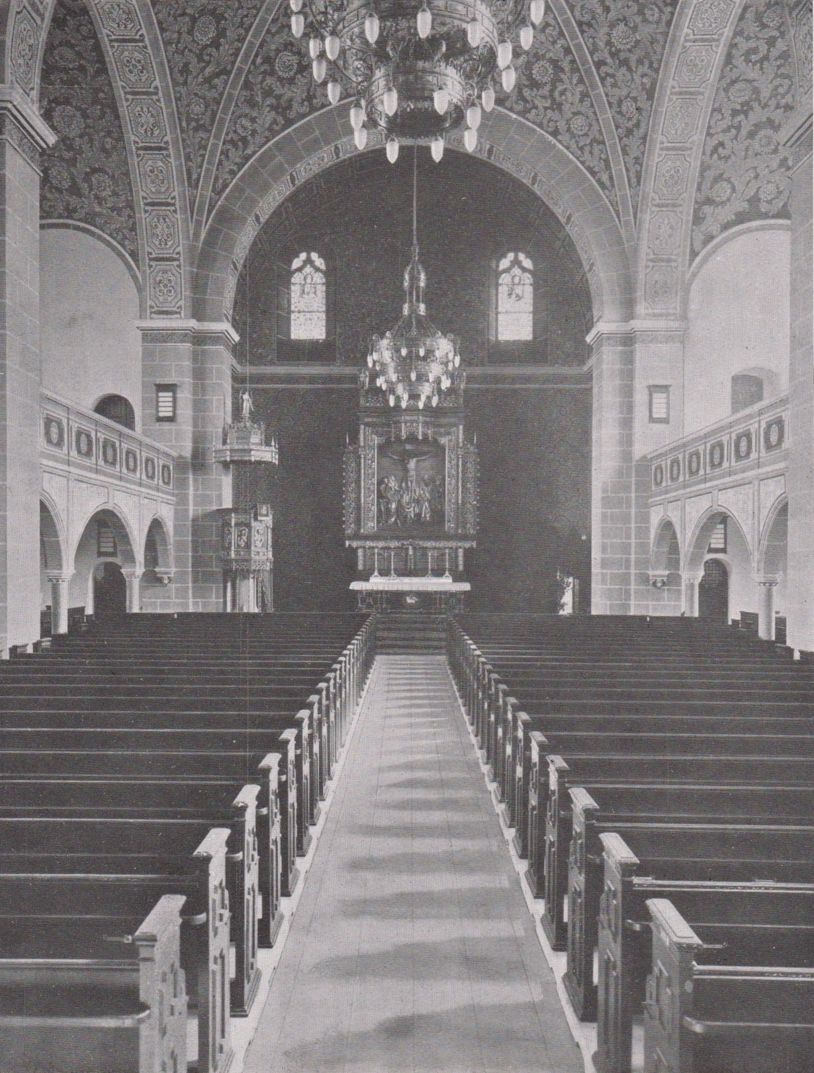 Pauluskirche Innenraum Breslau 1926, 1945 zerstört